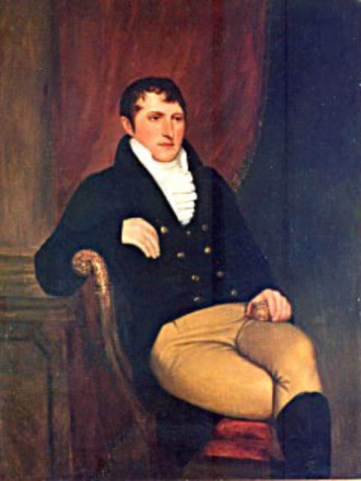 Retrato de Manuel Belgrano, obra de Pridiliano Pueyrredón. Es una obra similar al conocido cuadro de Francois Casimir Carbonnier, aunque con ligeras modificaciones. Nótese por ejemplo la posición de la mano izquierda, que en este cuadro está situada en un costado y en el original se apoya sobre la pierna derecha del prócer